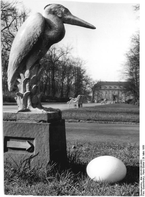 Berlin, Tierpark, Plastik Zentralbild Ulmer-Quaschinsky 31.3.1959 Osterüberraschung im Tierpark: Osterei von fast 3 1-2 Pfund Als besondere Überraschung für die Besucher des Berliner Tierparks legte am Sonntagvormittag (29.3.1959) Frau Strauß ein Ei mit einem Gewicht von 1 720 Gramm. UBz: "Wer hat mir den hier ein fremdes Ei in das Nest gelegt?" fragt sich der Fischreiher, auch wenn er nur aus Stein ist.